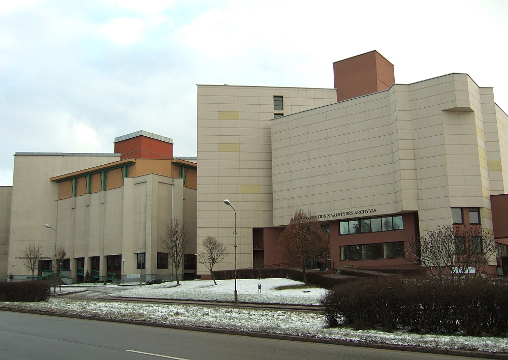 Lietuvos centrinis archyvas